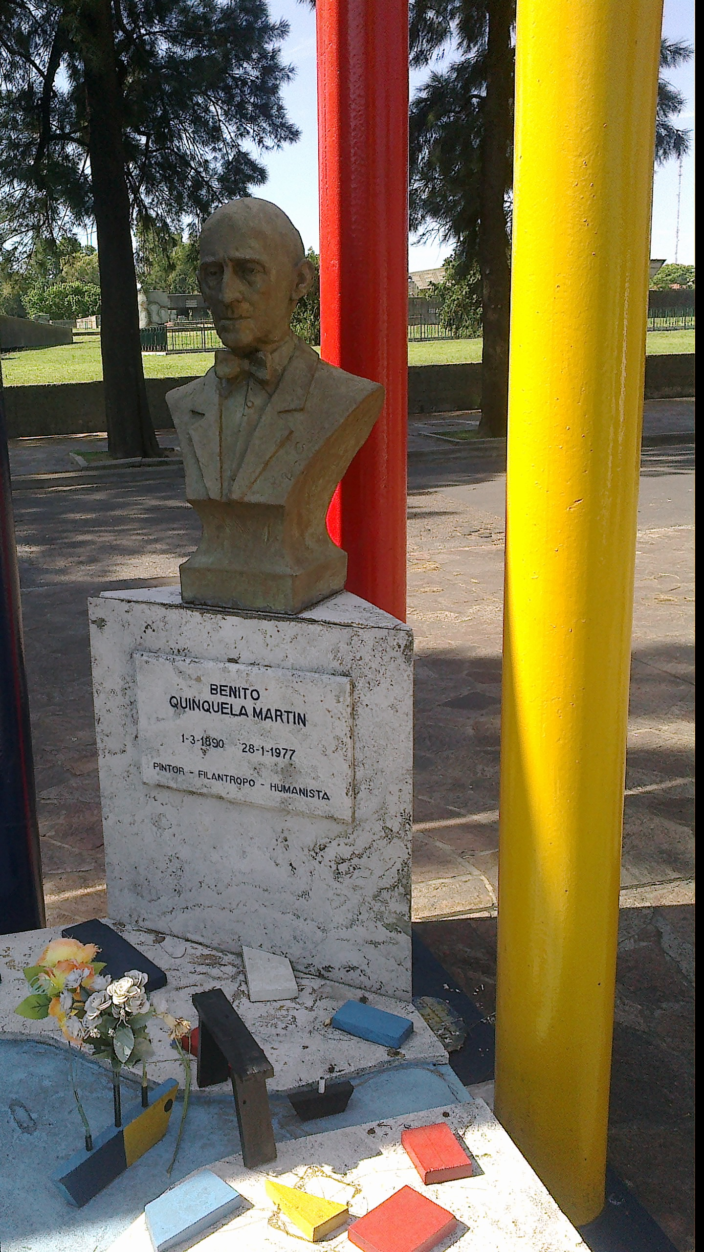 Lápida y tumba de Quinequela Martín, en el Cementerio de la Chacarita, Buenos Aires, Argentina.